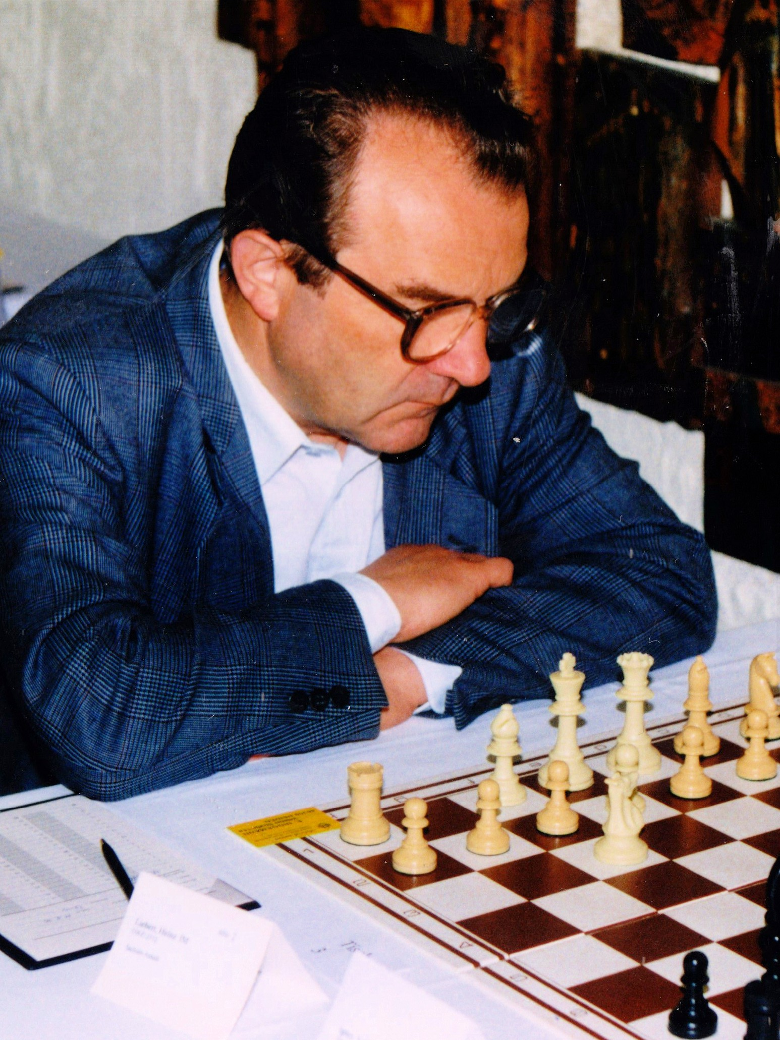 Heinz Liebert, Deutsche Seniorenmeisterschaften 1996 im Schach in Friedrichroda (Thüringen).